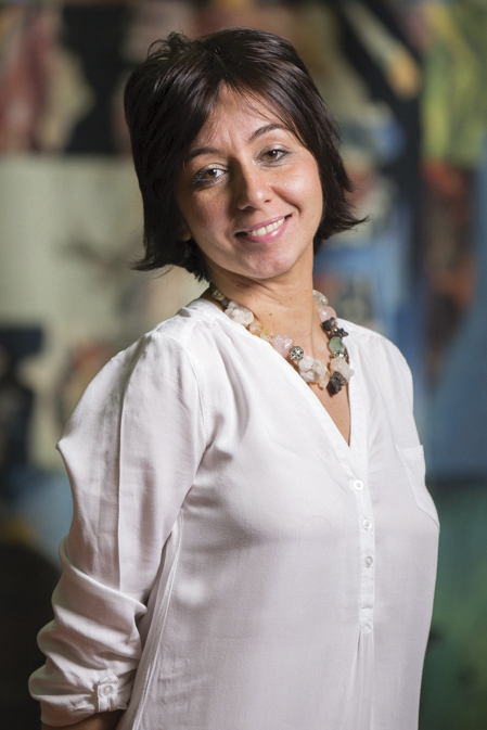 Српски (ћирилица): др Наташа Рајић